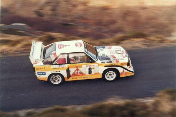 Photo prise lors du passage du RALLYE MONTE CARLO 1986, à AIX LES BAINS.